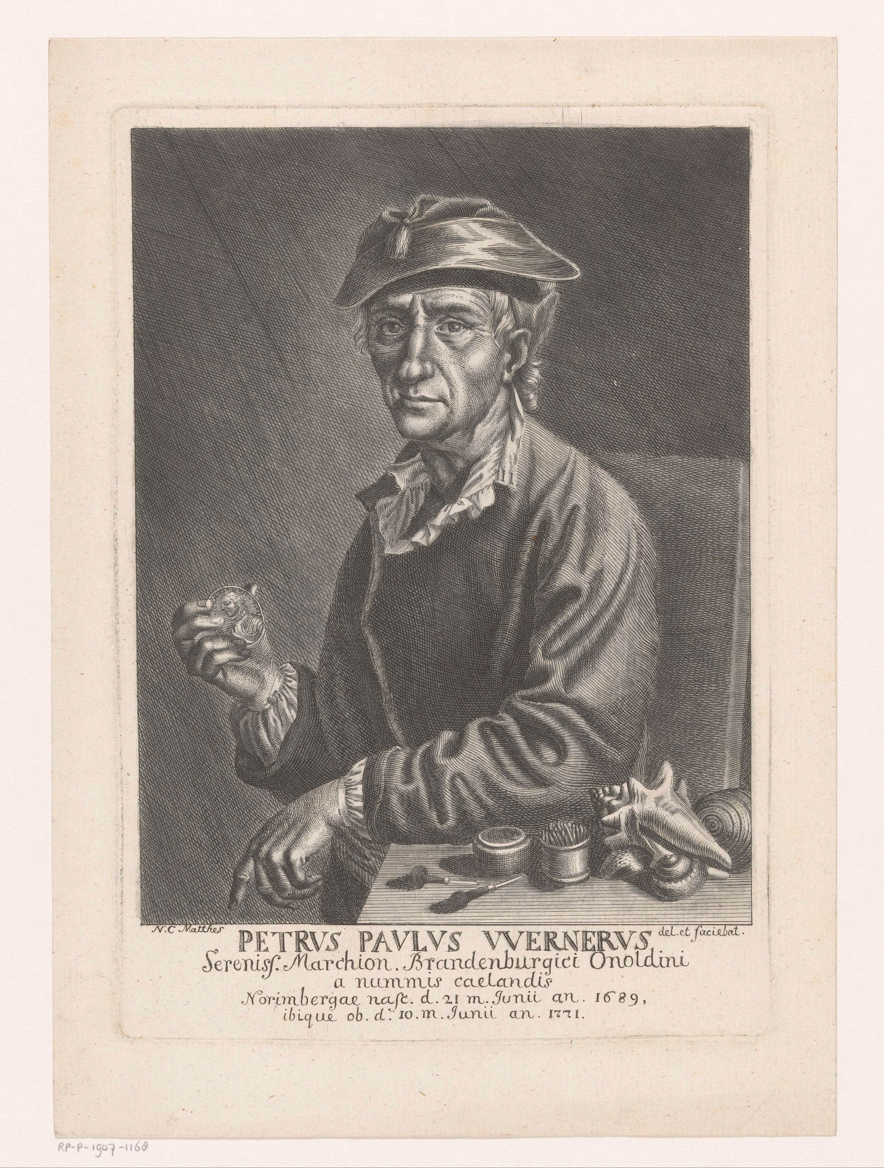 IdentificatieTitel(s): Portret van Peter Paul WernerObjecttype: prent Objectnummer: RP-P-1907-1168Catalogusreferentie: HAB A 23801Opschriften / Merken: verzamelaarsmerk, verso, gestempeld: Lugt 2228Omschrijving: Portret van Peter Paul Werner. Op de tafel naast hem liggen schelpen, een muntstempel en twee burijnen. In zijn hand houdt hij een munt.VervaardigingVervaardiger: prentmaker: Nicolaus Christoph Matthes (vermeld op object)naar tekening van: Nicolaus Christoph Matthes (vermeld op object)Plaats vervaardiging: NeurenbergDatering: 1771 - 1796Fysieke kenmerken: etsMateriaal: papier Techniek: etsenAfmetingen: plaatrand: h 257 mm × b 179 mmOnderwerpWat: historical personsWie: Peter Paul WernerVerwerving en rechtenVerwerving: aankoop 1905Copyright: Publiek domein